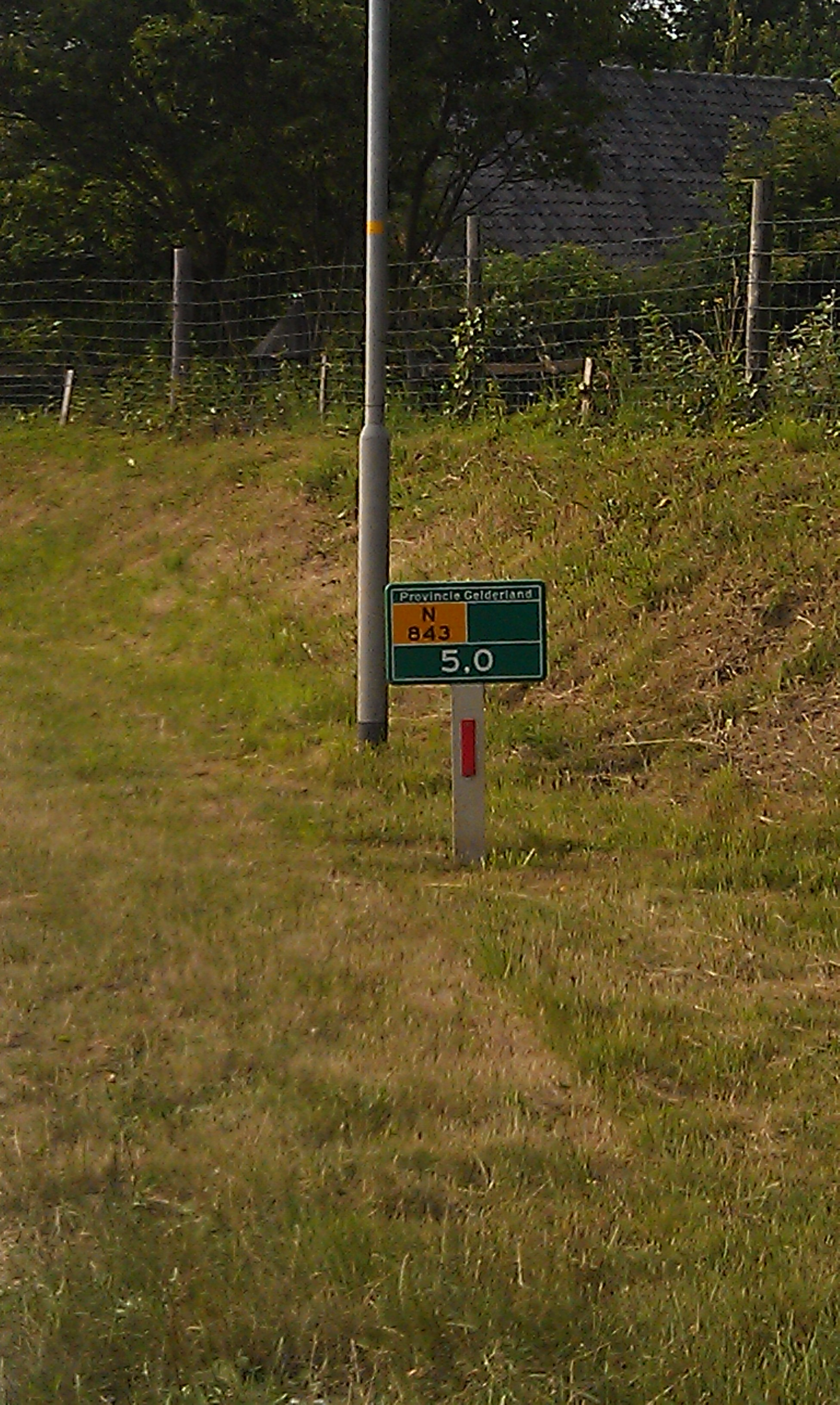 Provincialeweg 843 bij Grafwegen